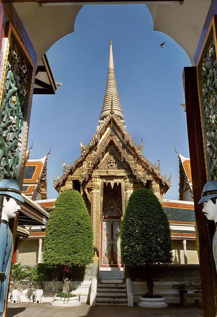 Wat Rajabophit (วัดราชบพิธสถิตมหาสีมารามราชวรวิหาร), Bangkok, May 2002